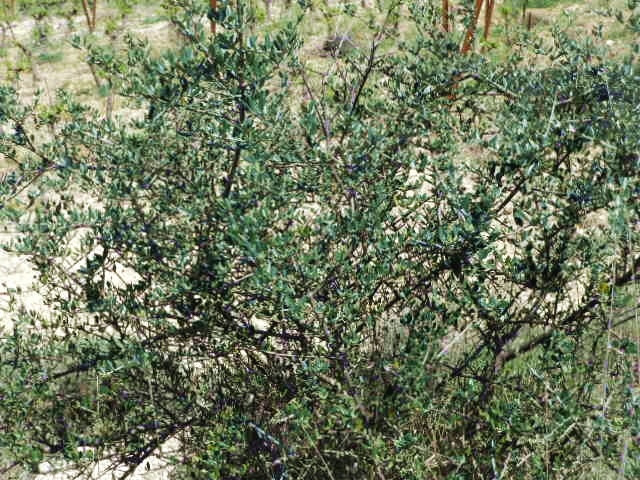 Souche d'olivier abandonné après le gel de 1956 avec rejets à allure d'oléastre.